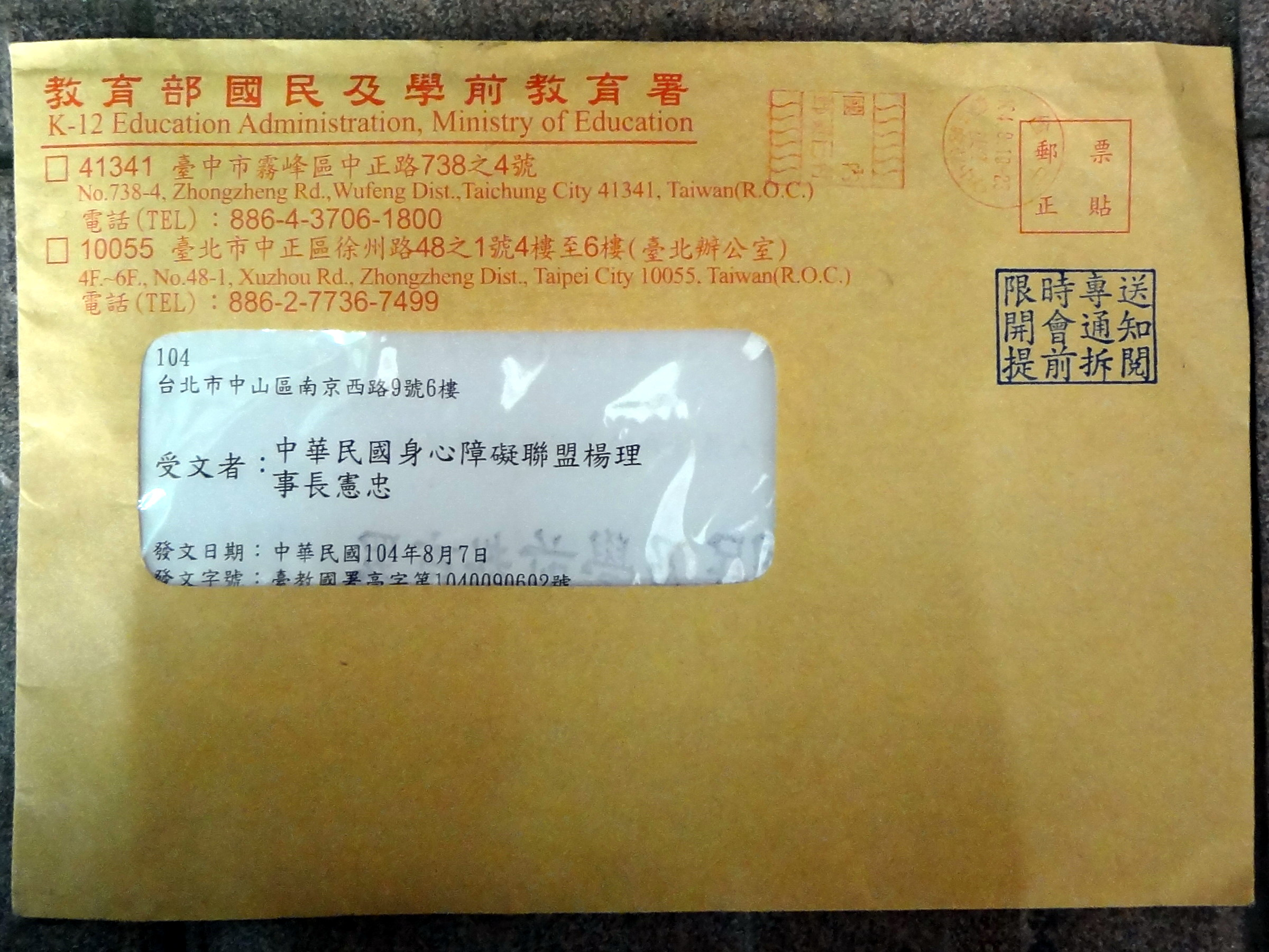 2015年（中華民國104年）中華民國教育部國民及學前教育署公文封，寄開會通知單給中華民國身心障礙聯盟理事長楊憲忠，發文日期為2015年8月7日。